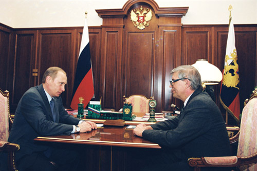 МОСКВА, КРЕМЛЬ. С Сергеем Игнатьевым.